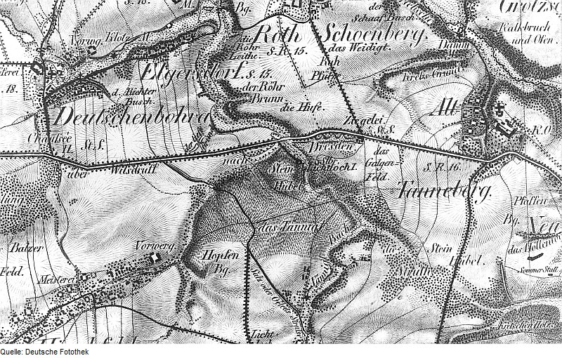 Original image description from the Deutsche Fotothek Triebischtal-Rothschönberg. Rothschönberger Stollen, Ausschnitt, aus: Oberreit, Sect. Freiberg, vor 1843